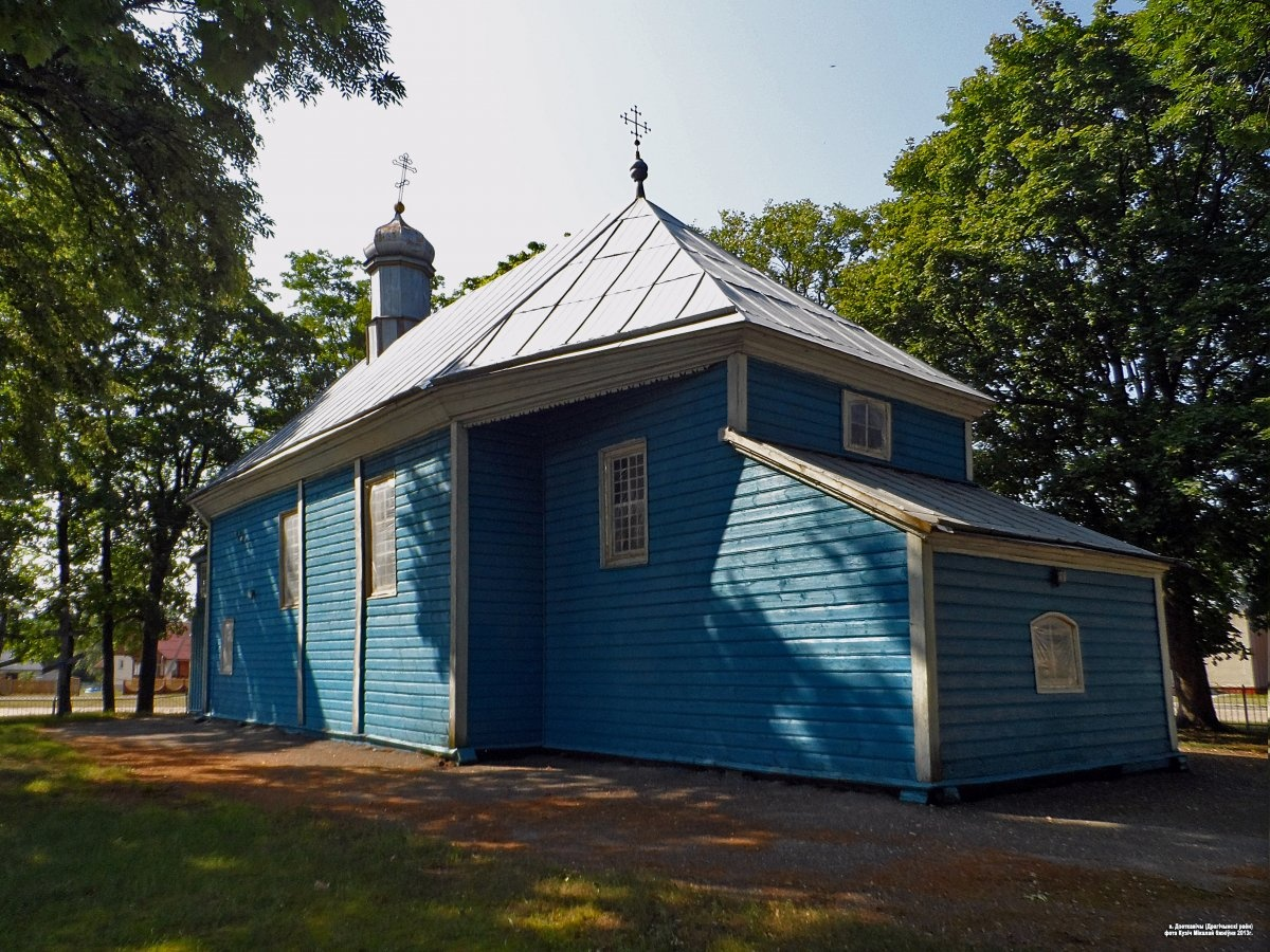 Свята-Пакроўская царква ў Дзеткавічах Драгічынскага раёна. Выгляд з боку апсіды